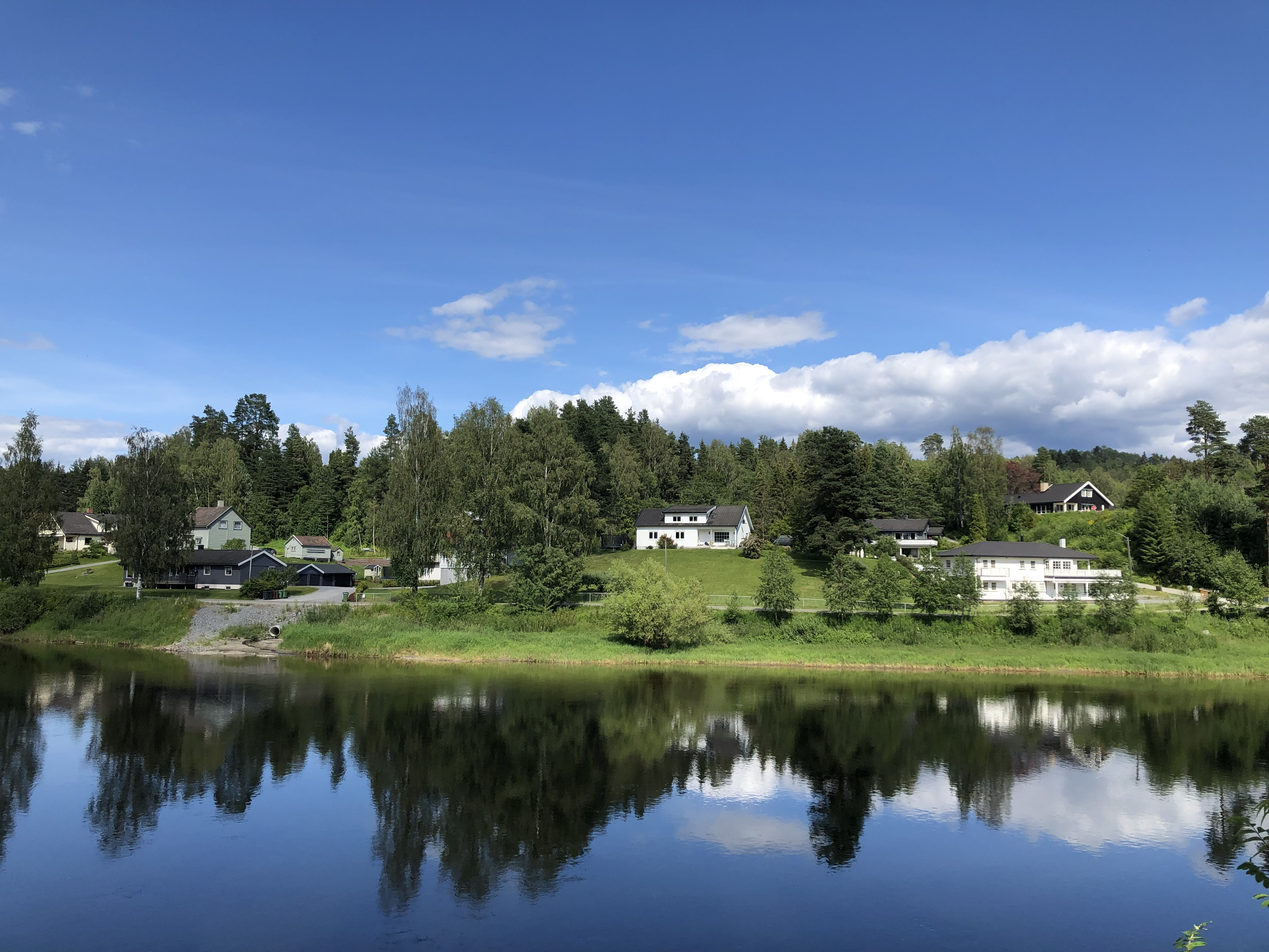 Støalandet i Hønefoss, sett fra Aabenraagata på Schong.